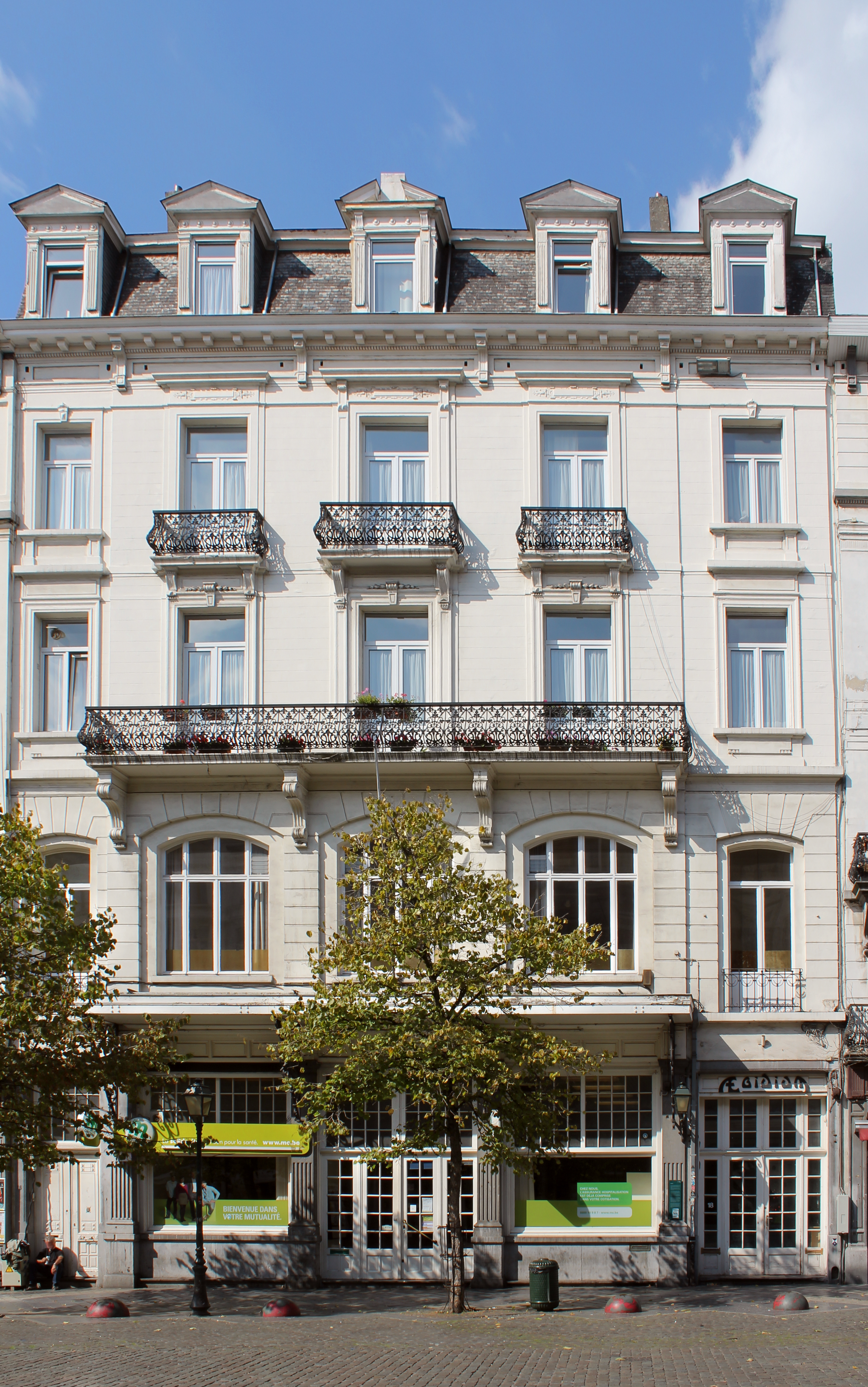 Façade de l'ancien cinéma Aegidium contruit en 1905 par Guillaume Segers et situé parvis de Saint-Gilles 18, à 1060 Bruxelles, en Belgique